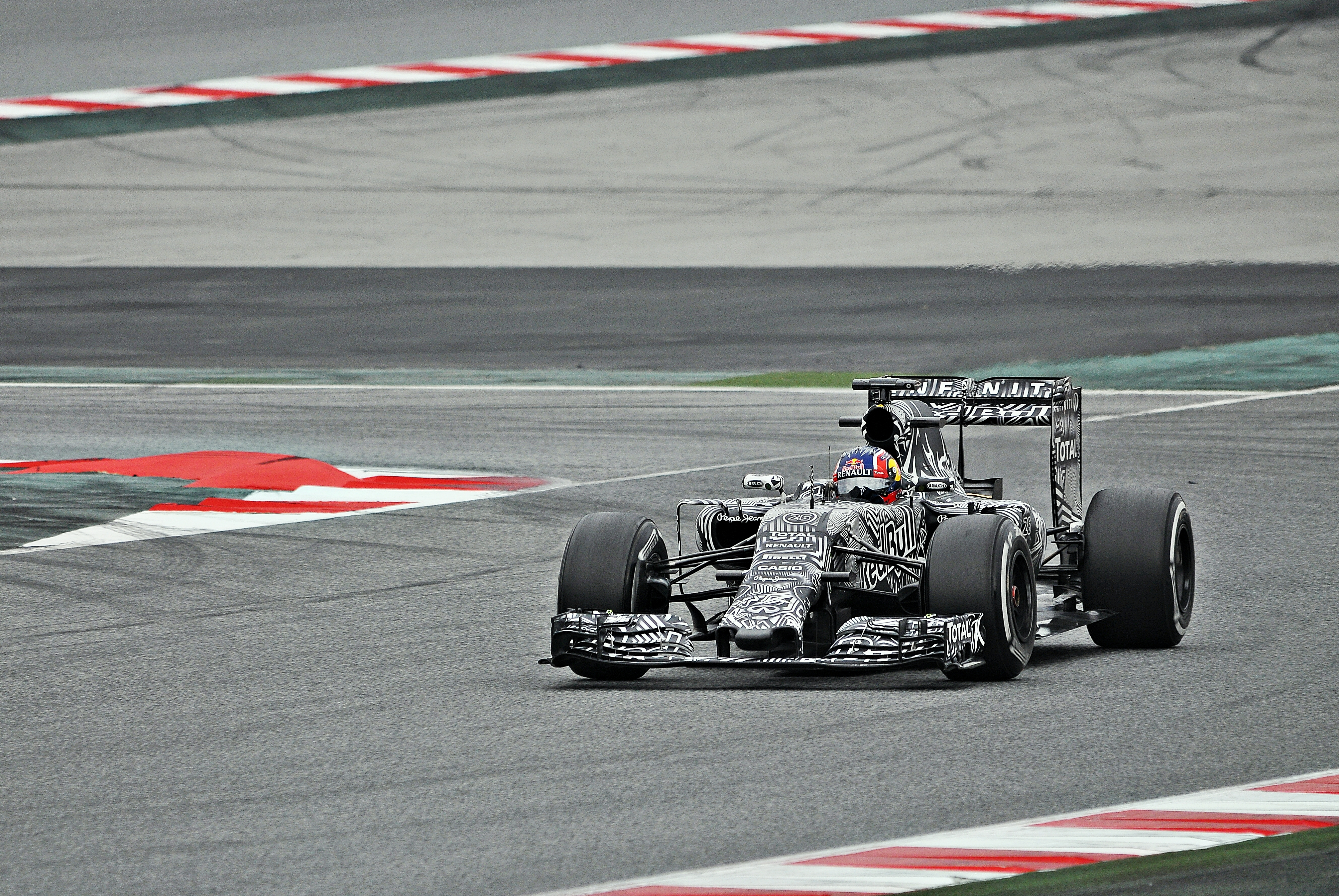 Test days Barcelona 2015